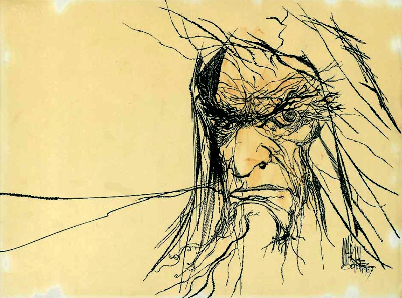 S/T. Tinta / papel. 30 x 21 cm. Marcial Gómez 1967